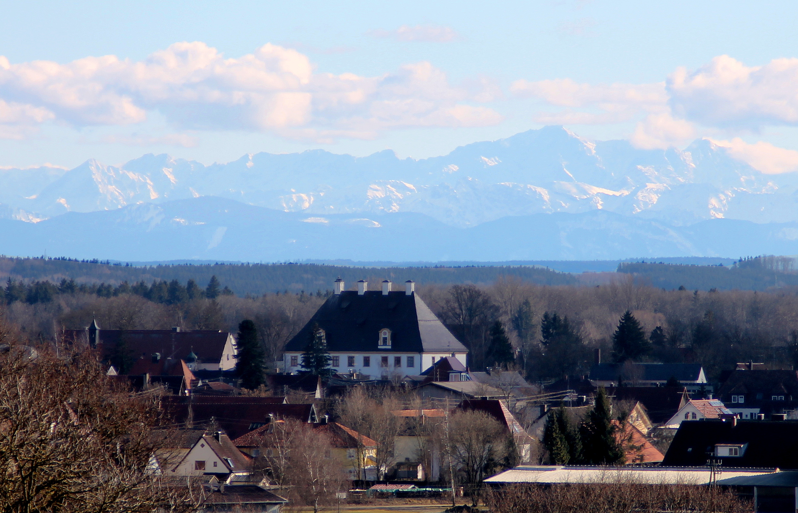 Das Türkheimer Schloss aus der Ferne, im Hintergrund die Alpen mit der Zugspitze